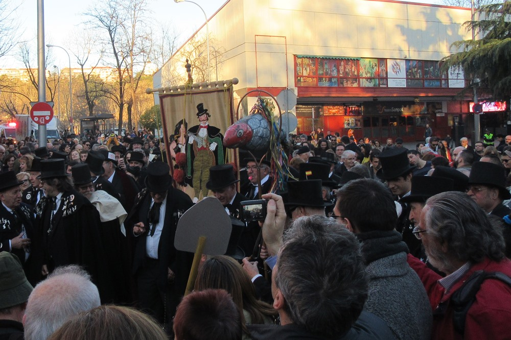 Madrid despedide el Carnaval 2017 con un vistoso y alegre Entierro de la Sardina.